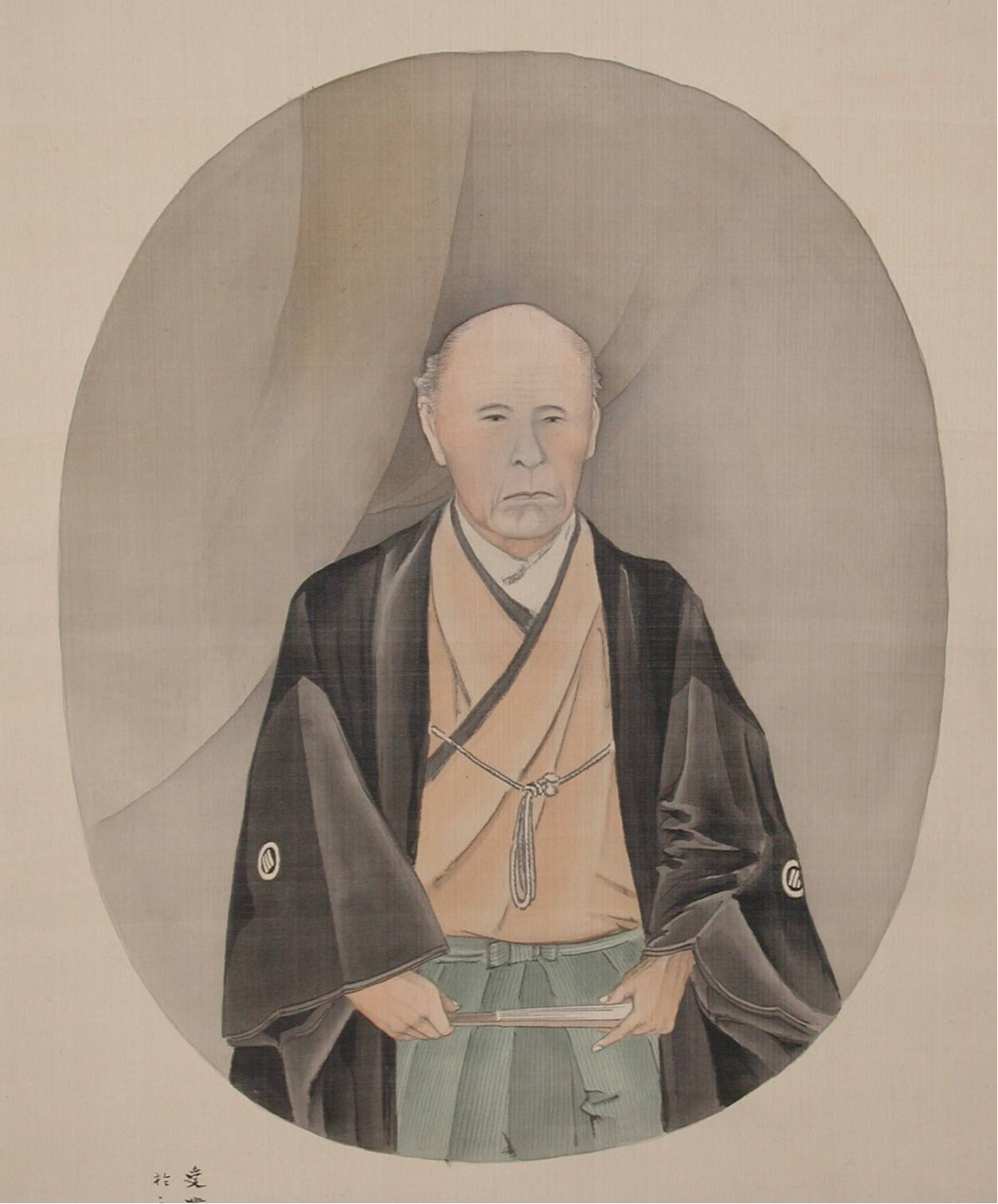 奥宮慥斎の肖像画（河田小龍画） （高知市立高知市民図書館奥宮文庫所蔵）